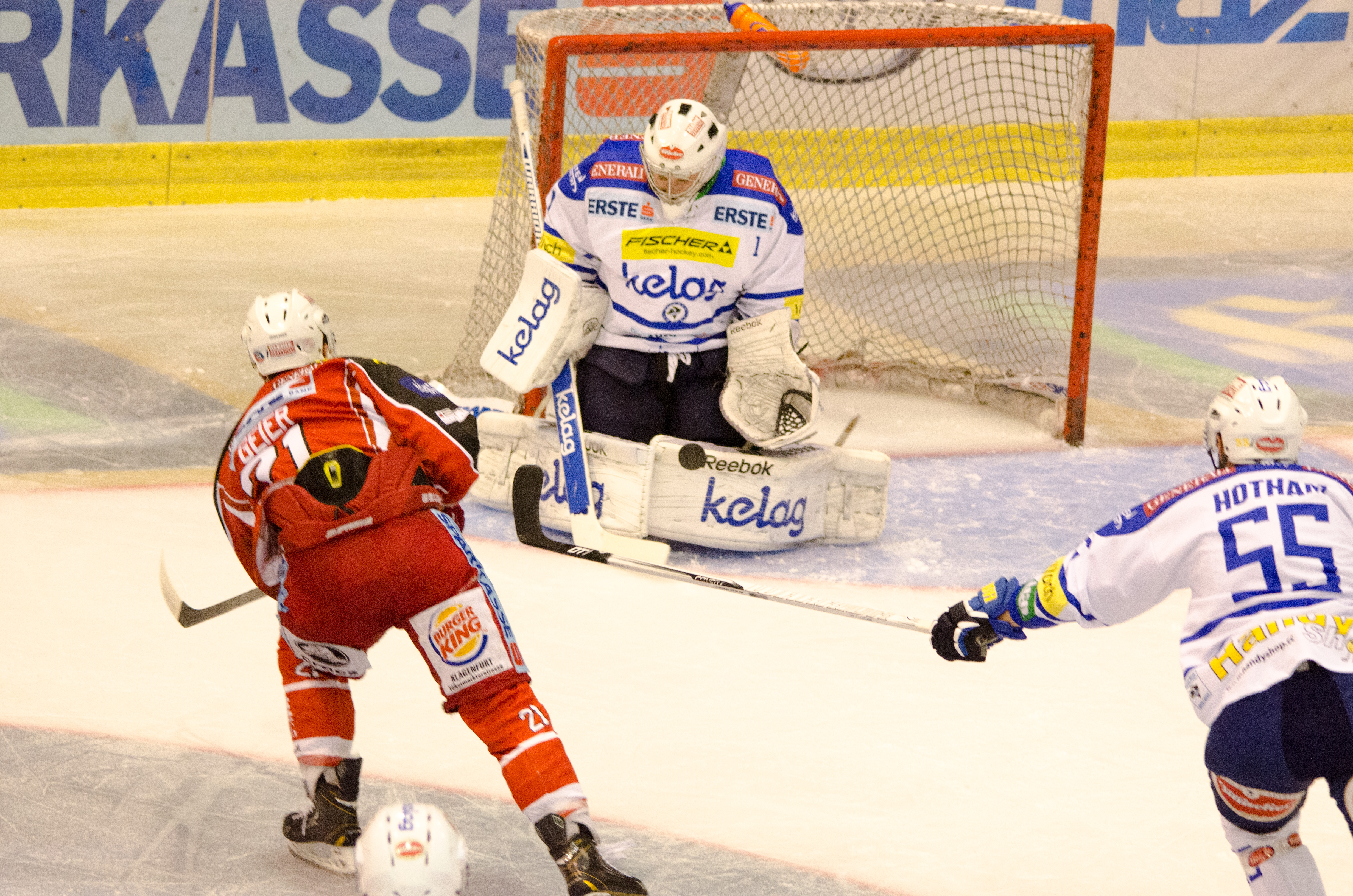 300 Kärntner Derby